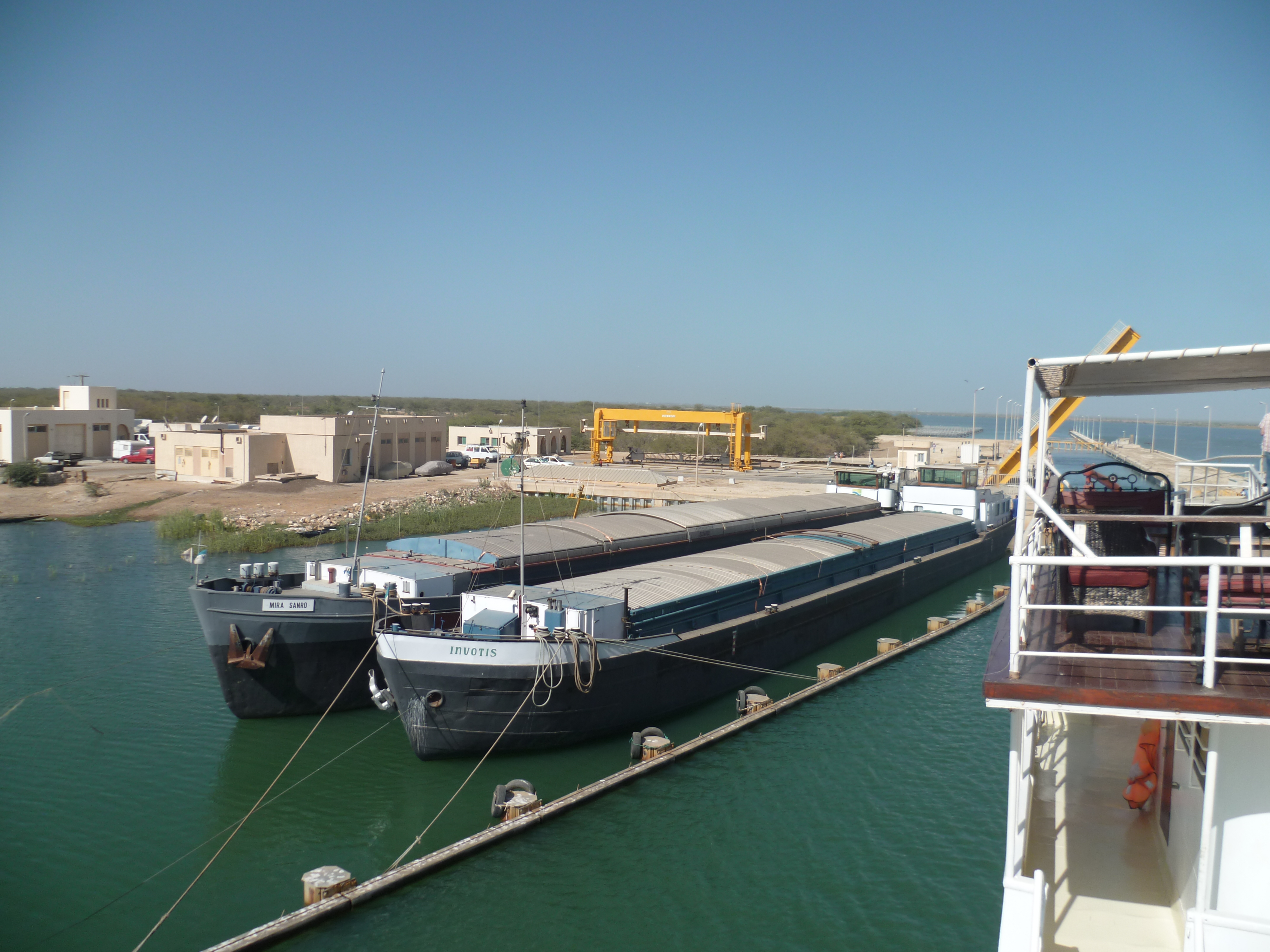 Sur le fleuve Sénégal, un barrage a été construit près de Diama, à une trentaine kilomètres de son embouchure, pour éviter la remontée des eaux salées dans les terres agricoles (néfastes à l'agriculture). Automoteurs Mira Sanro et Invotis à l’arrêt. This is an image with the theme "Africa on the Move or Transport" from: Senegal